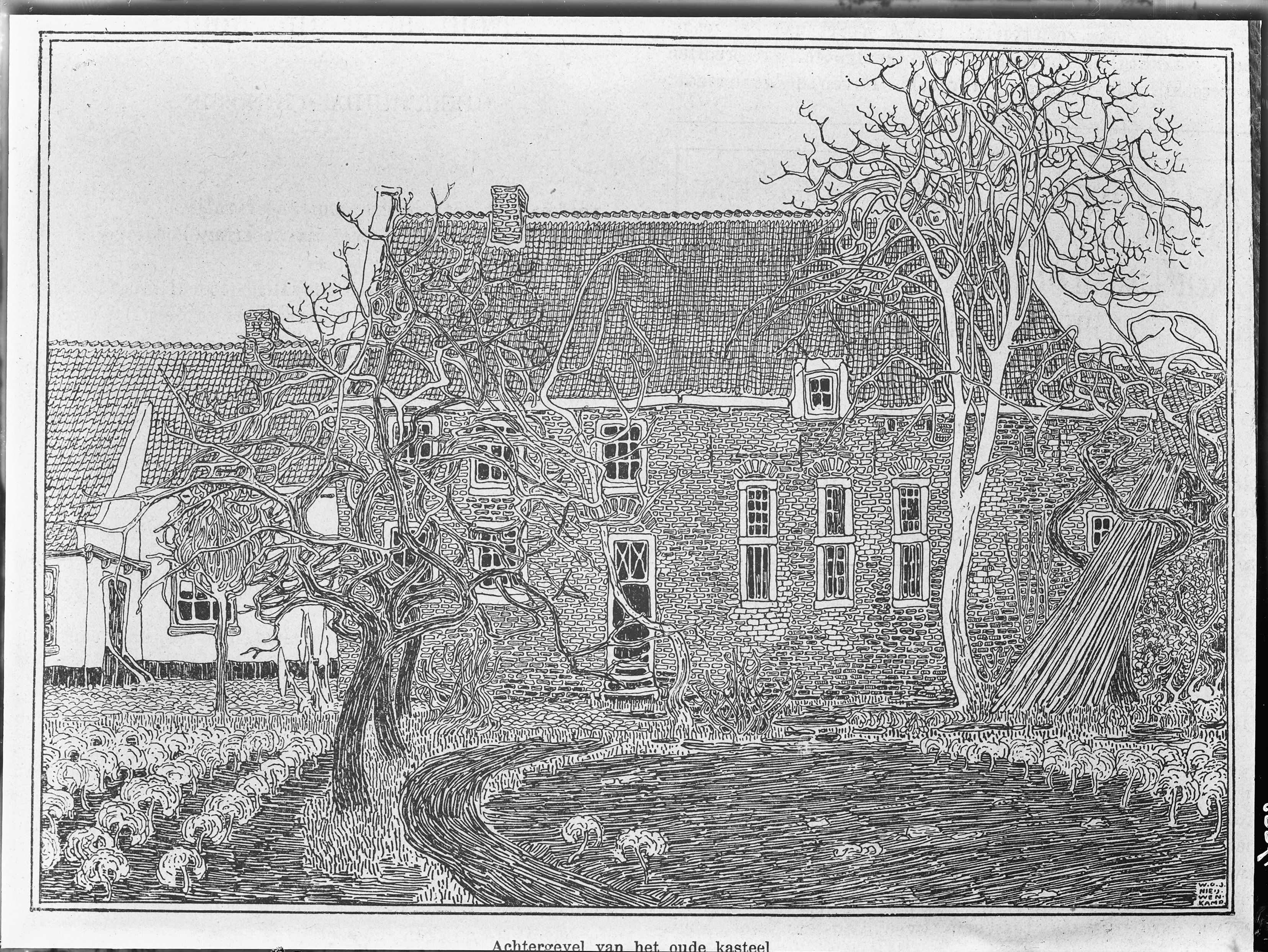 Kasteel: achtergevel naar tekening van W.O.J. Nieuwenkamp in "Eigen Haard" 1898